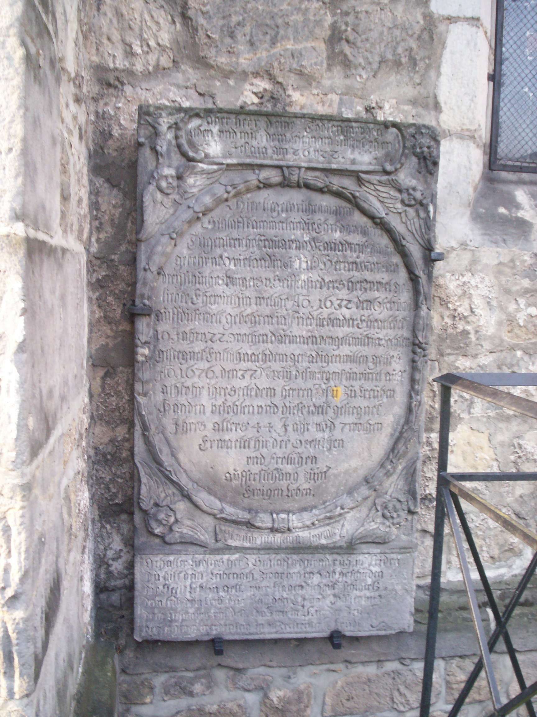 Kościół Franciszkański we Lwówku Ślaskim, epitafium.